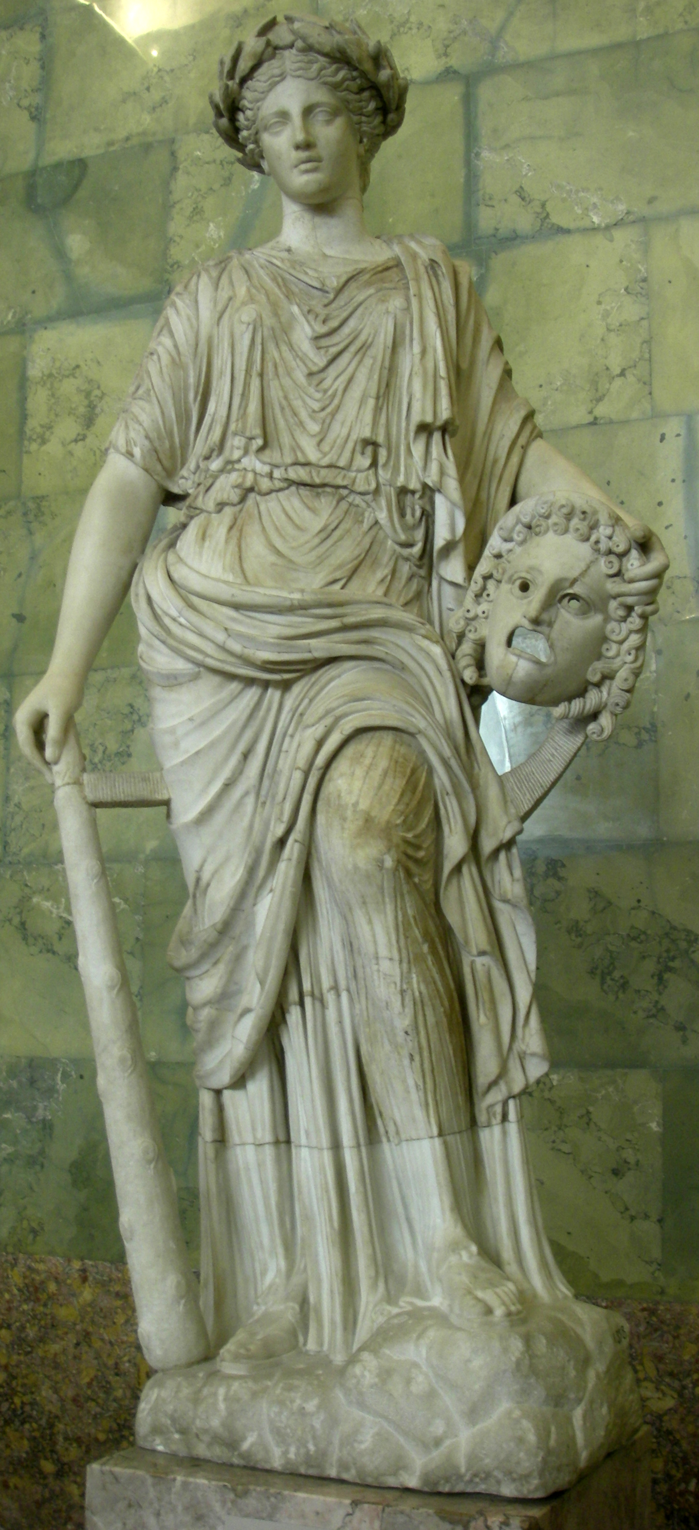 Мельпомена (Муза трагедии). Римская копия по греческому образцу, II в до н.э. Мрамор, А 378.